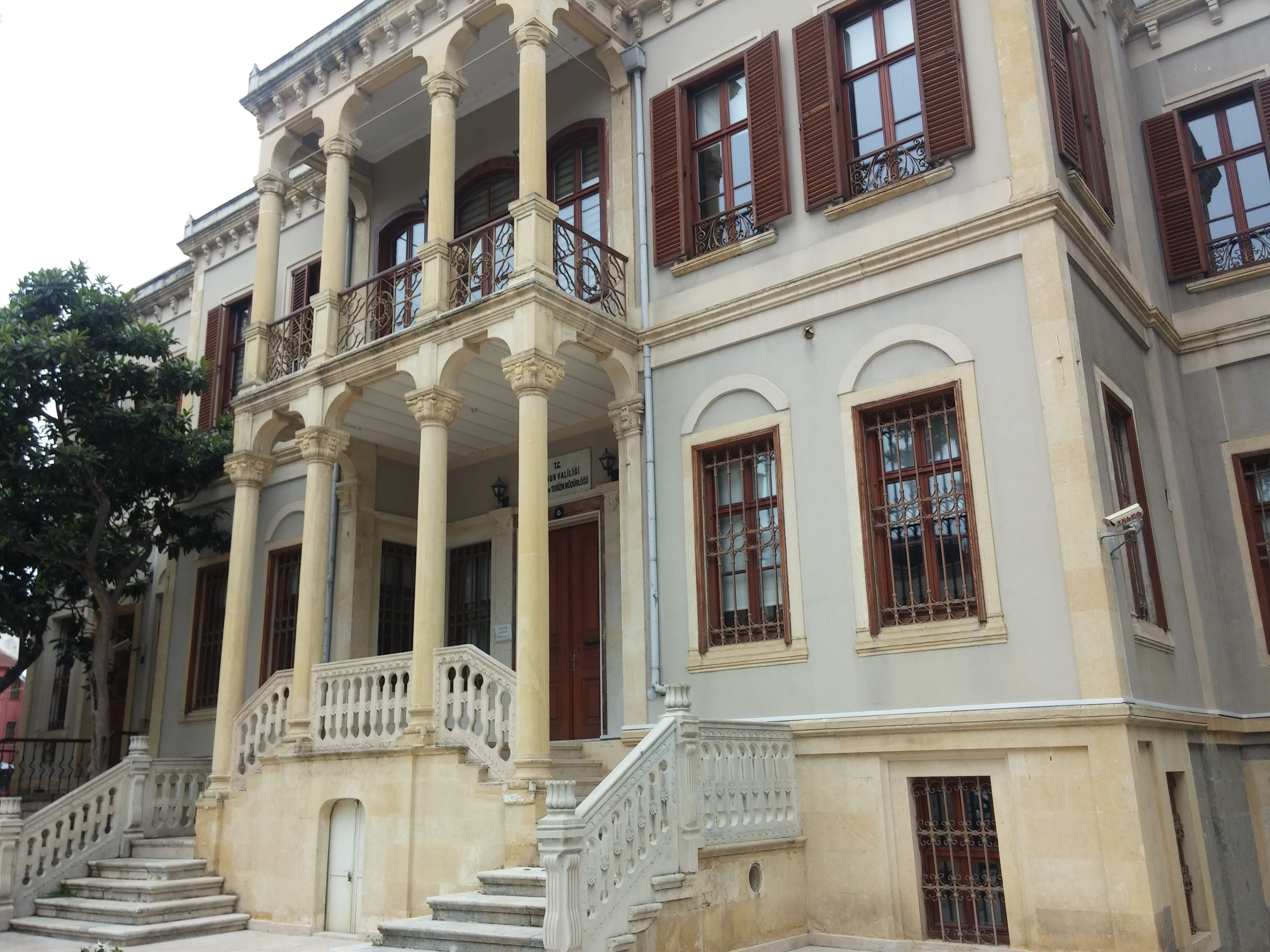 Samsun İl Kültür ve Turizm Müdürlüğü binası.